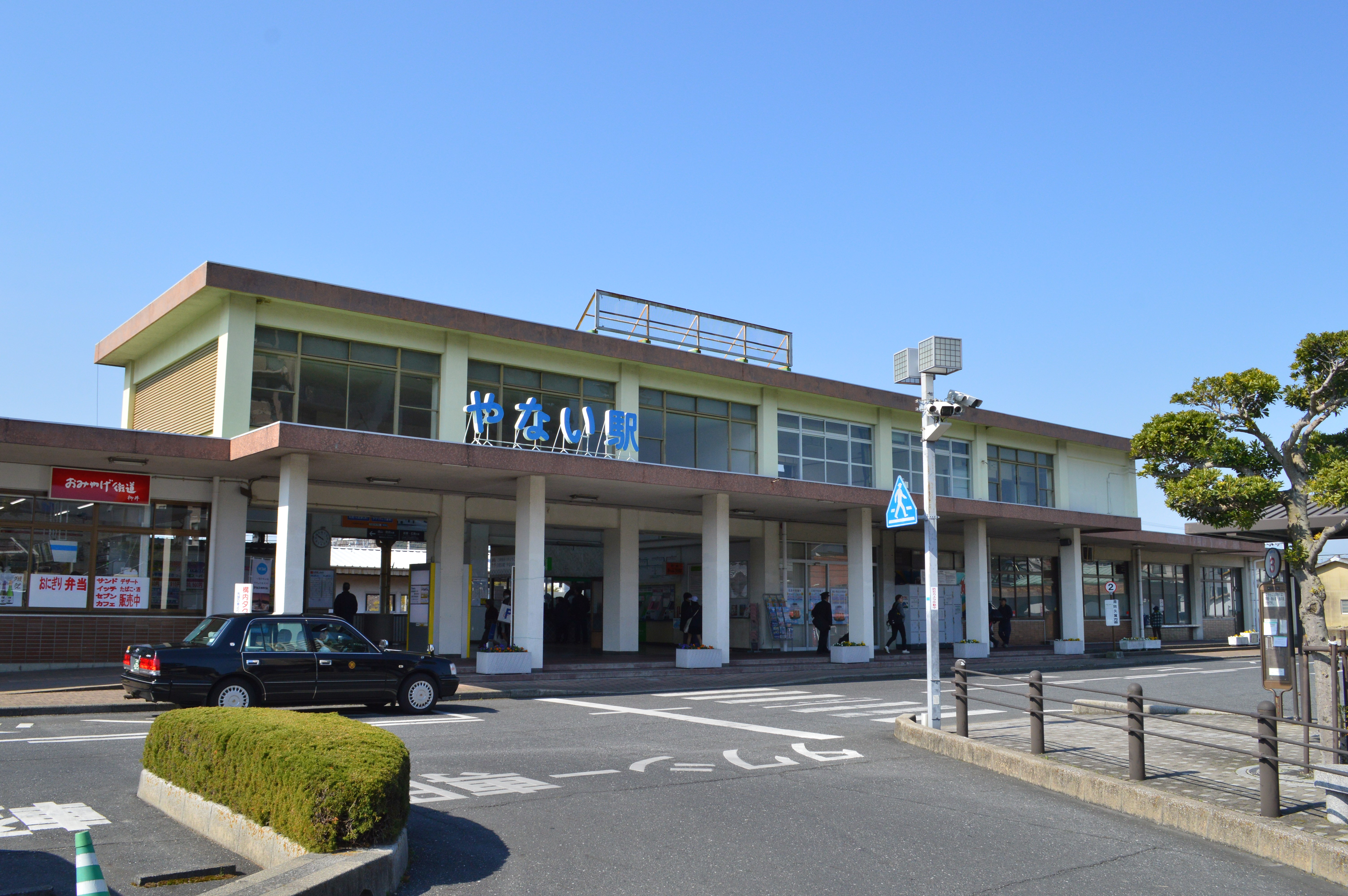 柳井駅 駅舎